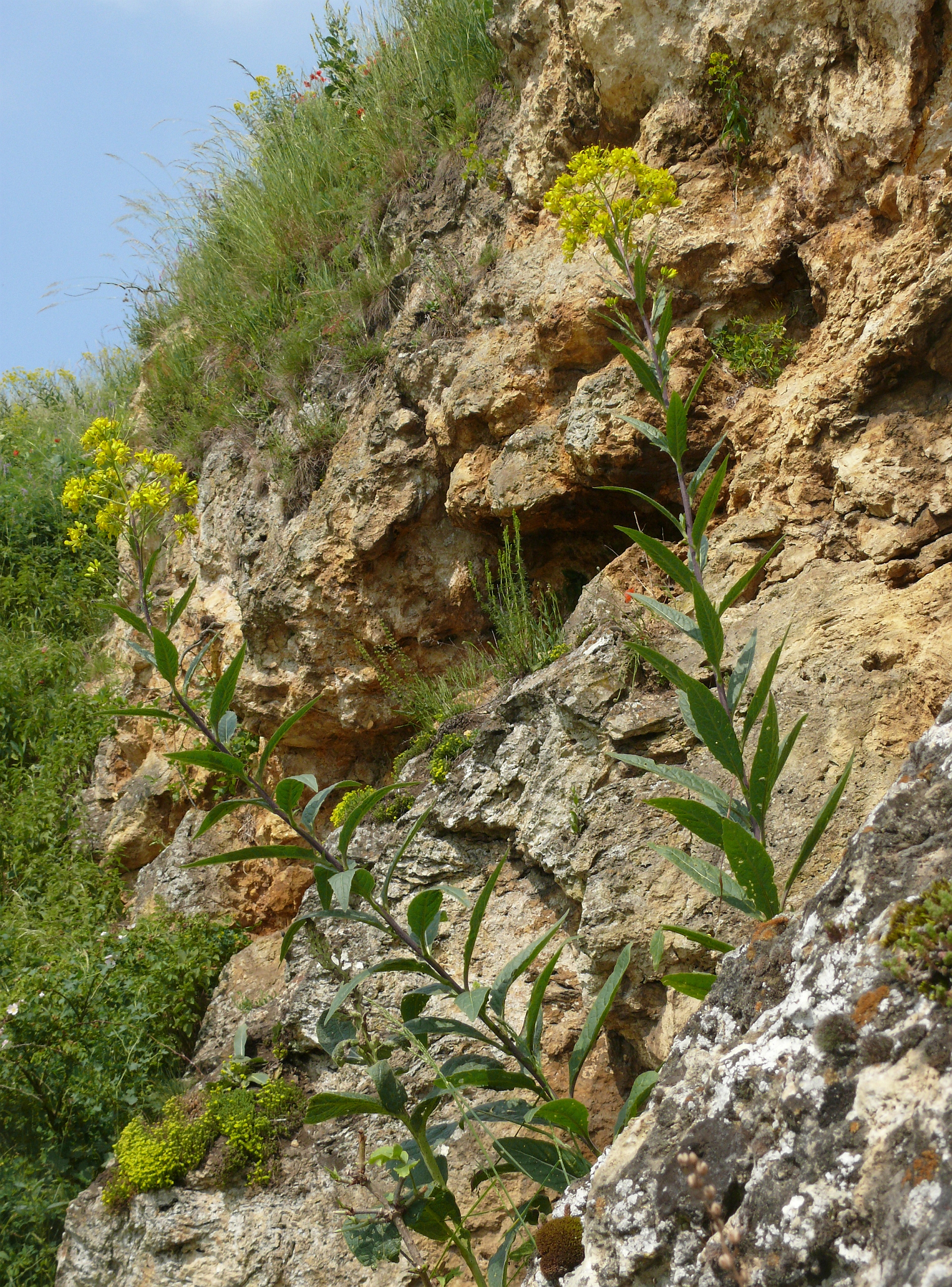 Sisymbrium strictissimum, Nördlinger Ries, Deutschland